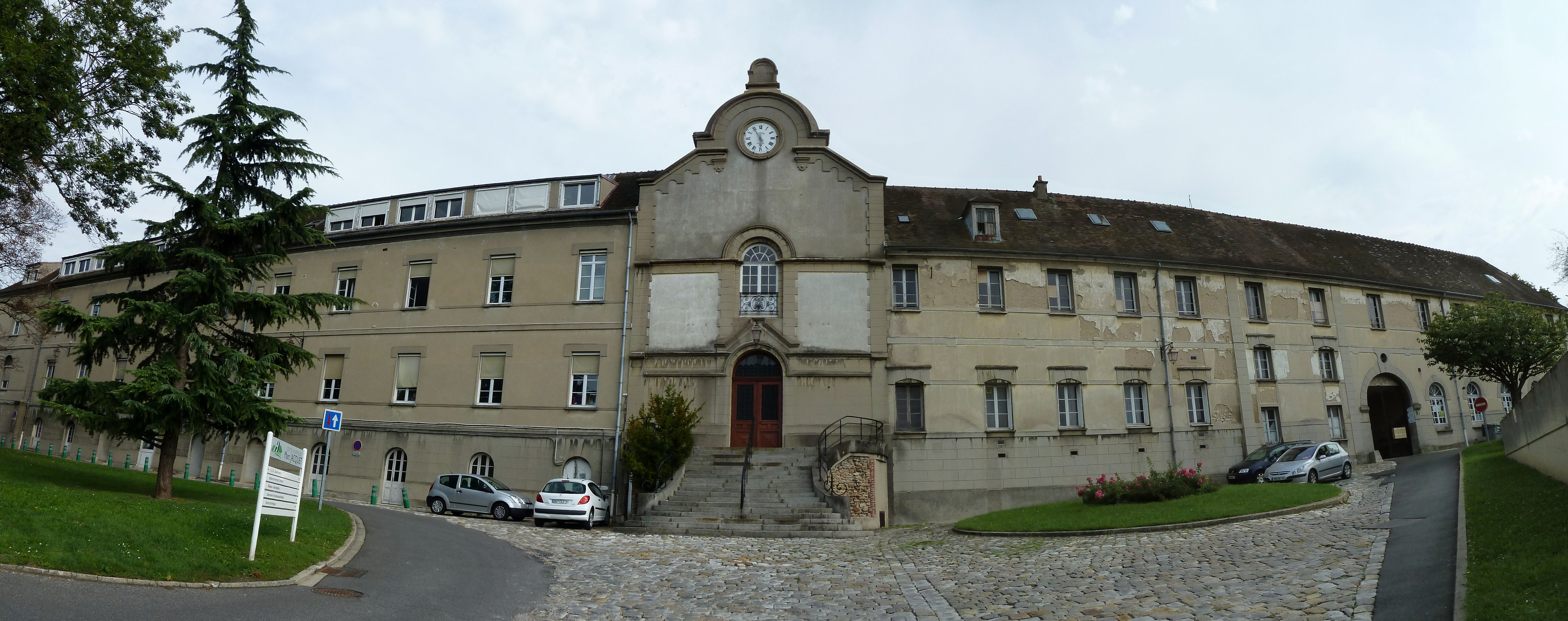 Vue panoramique du bâtiment, de face, dans la cour. Couvent bâti en 1616, reconverti en hôpital, fermé depuis 1980. .